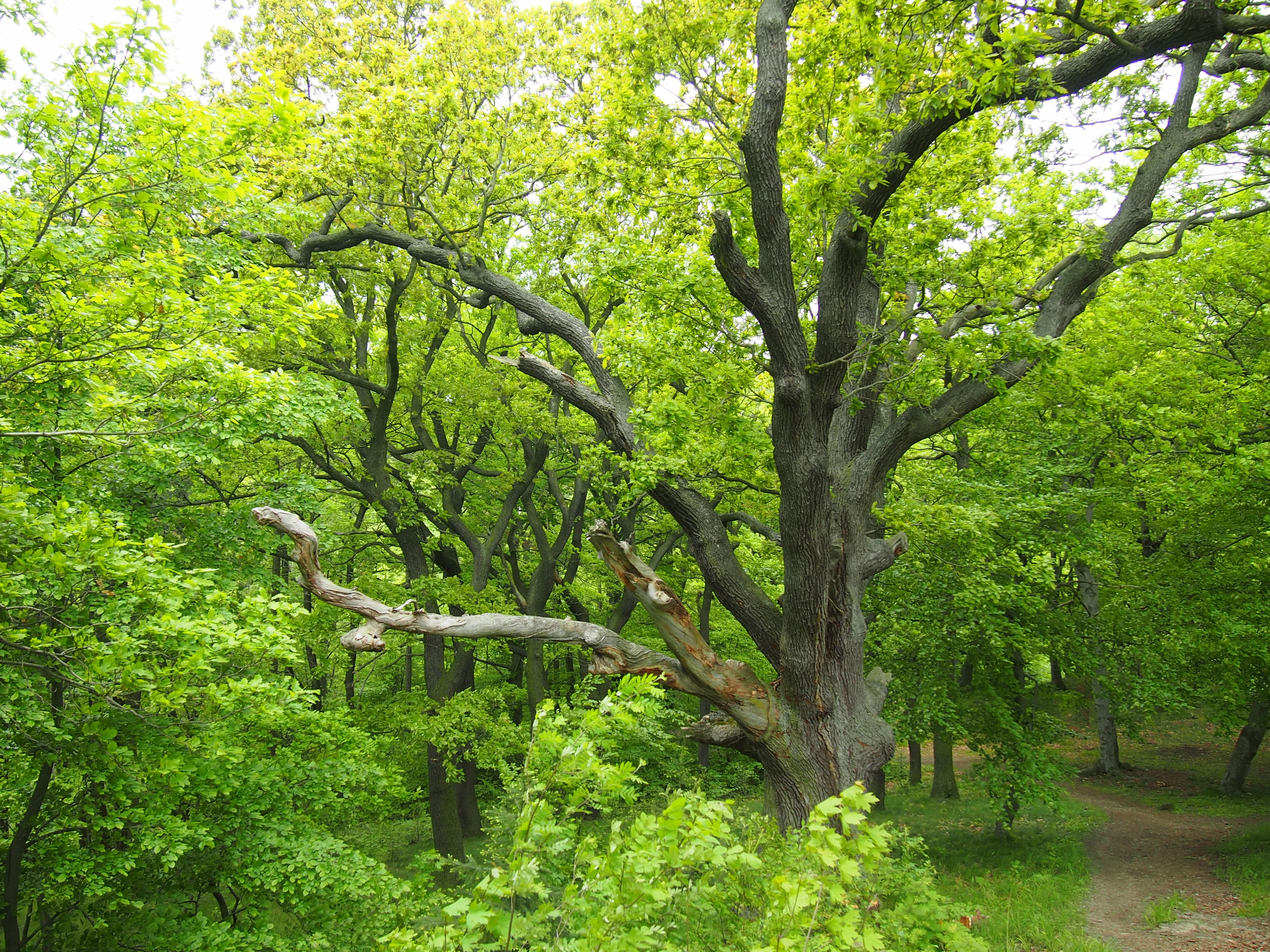 Alter Eichenwald an der Luisenburg